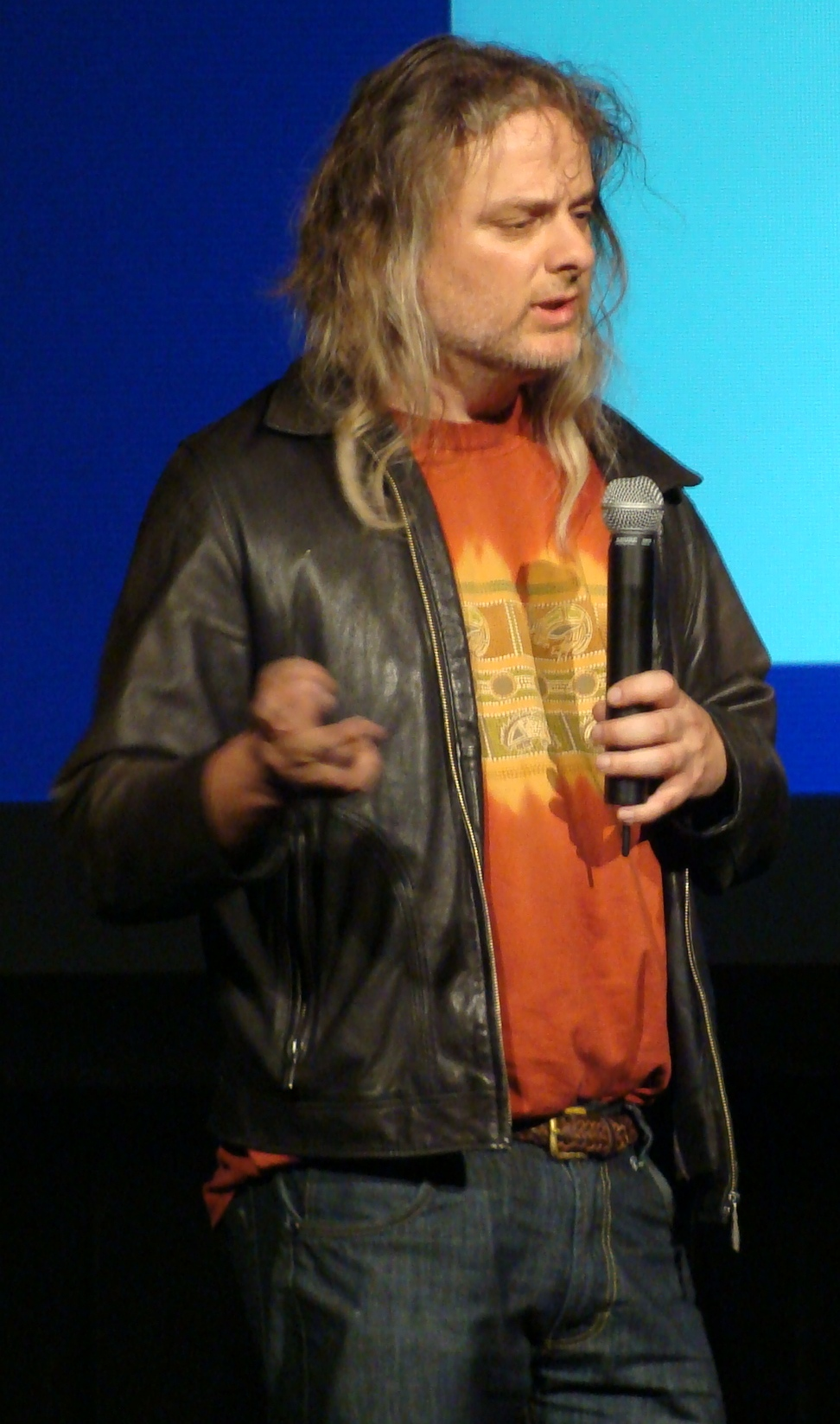 David Chalmers, Arizona